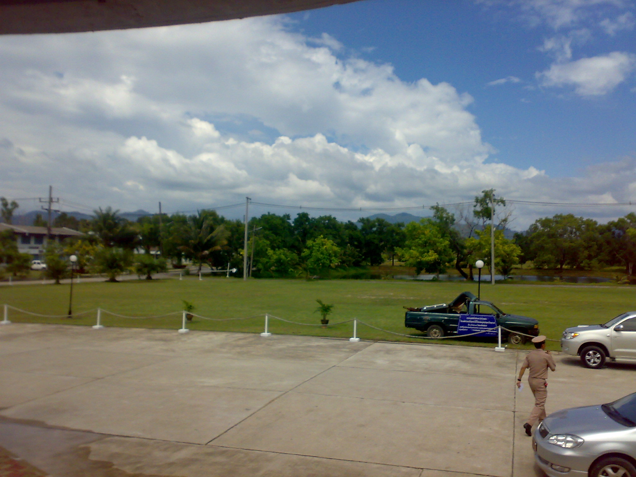 Phang Nga Naval Base, Thailand